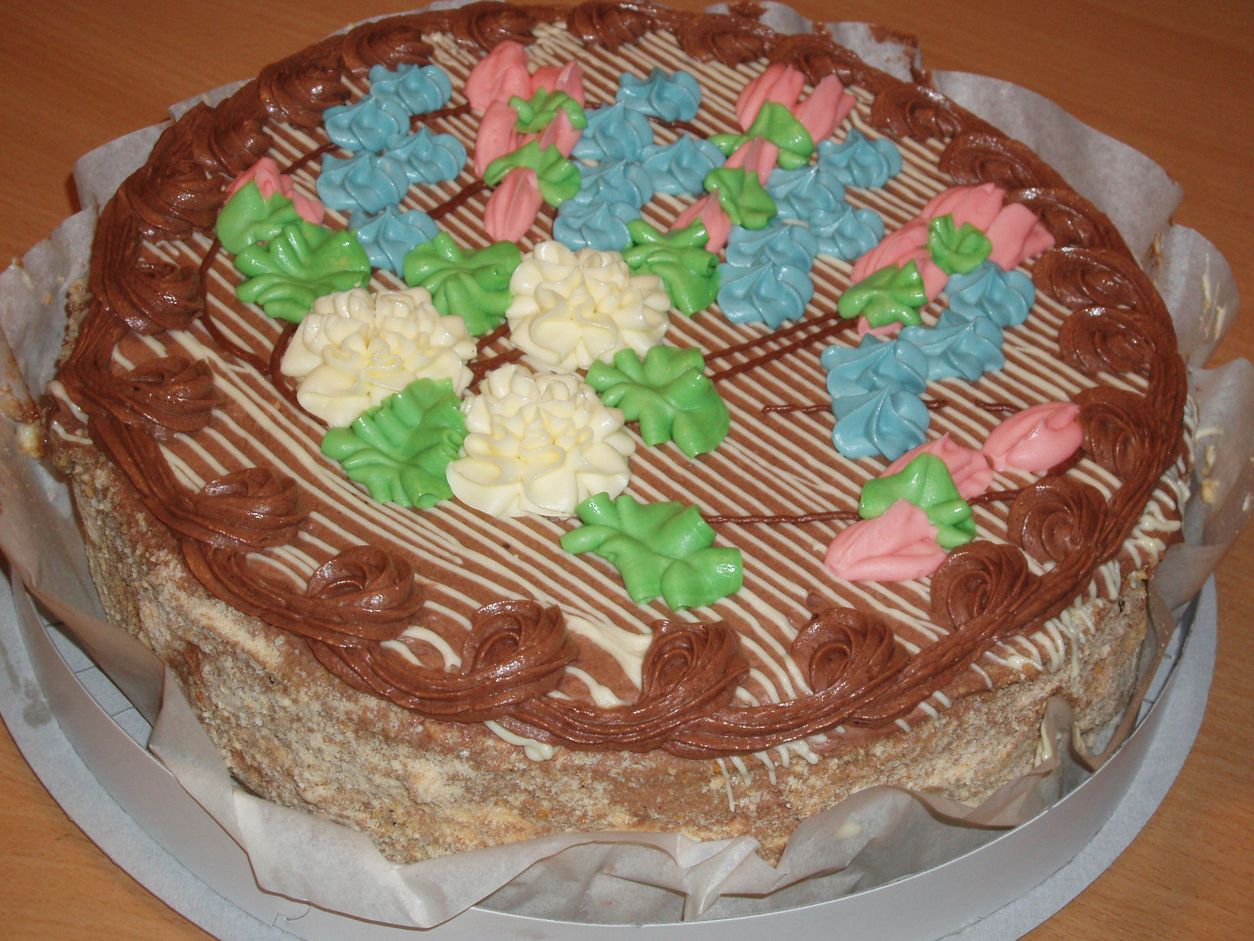 Київський торт без коробки